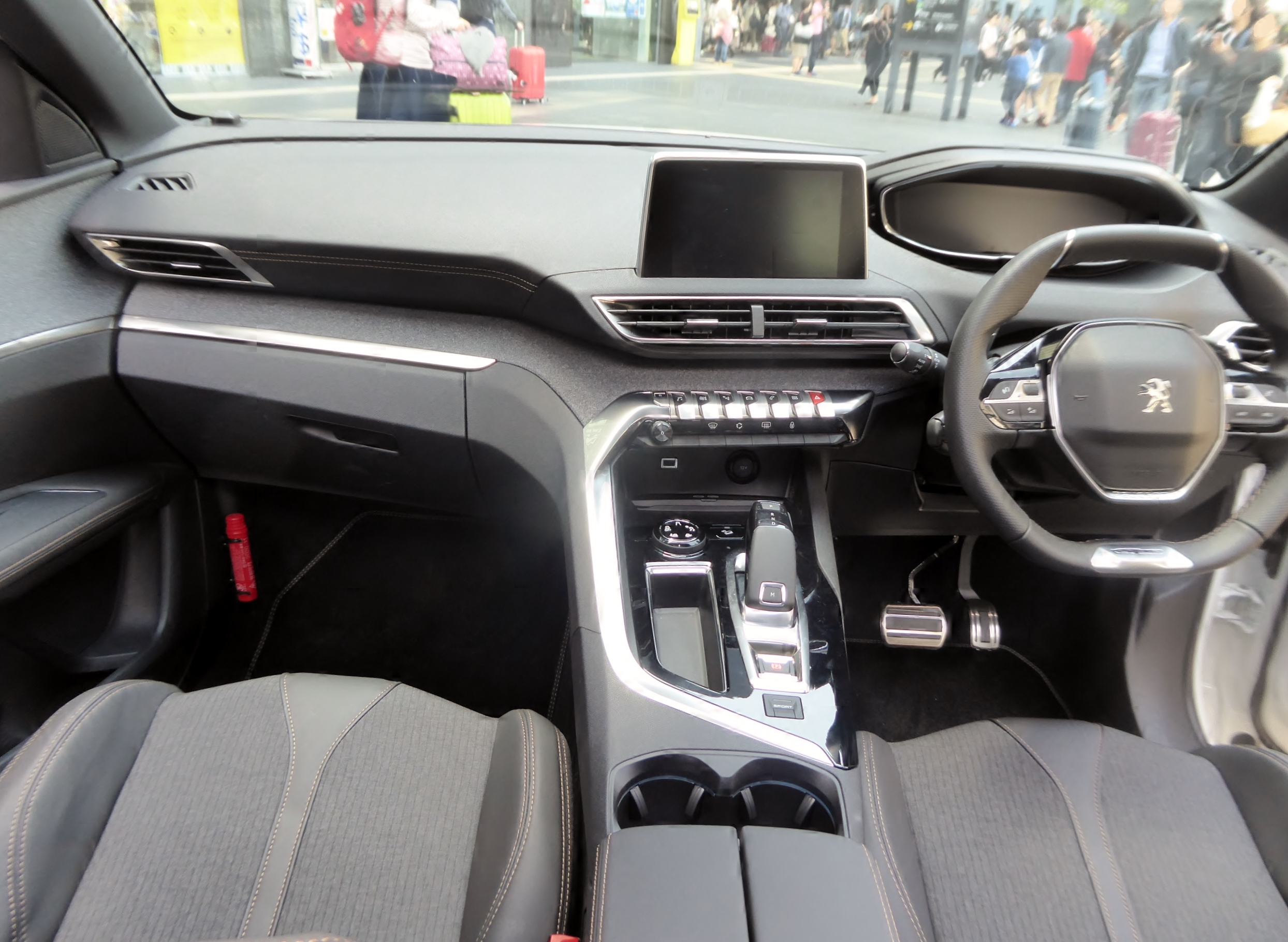 ABA-P845G01型プジョー・3008 GT Line DEBUT EDITIONのインテリアを撮影。